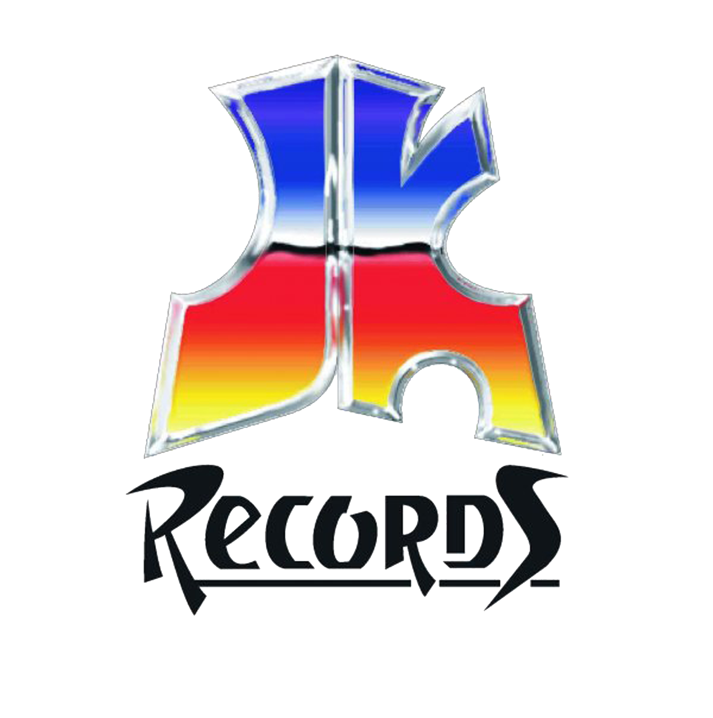 Logo JK Records